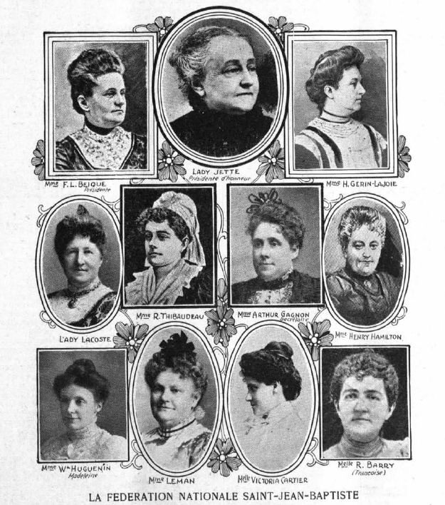 First presidential board, Fédération nationale Saint-Jean-Baptiste, Montréal, 1907. From right to left : Top : Caroline Dessaulles-Béique, Lady Jetté, Marie Lacoste Gérin-Lajoie ; Middle : Marie-Louise Globensky (Lady Lacoste), Marguerite Thibaudeau, "Mme Arthur Gagnon", "Mme Henry Hamilton" ; Bottom : Madeleine Huguenin, "Mme Leman", Victoria Cartier, Robertine Barry.